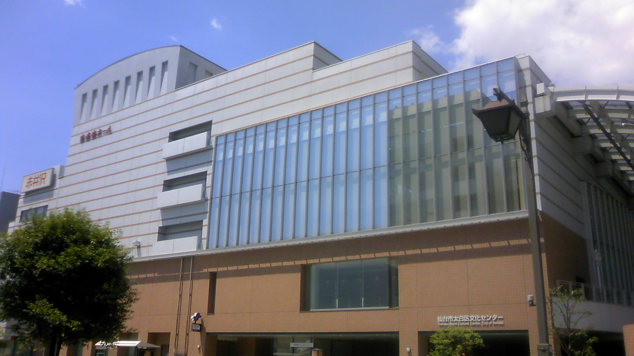 たいはっくる本館